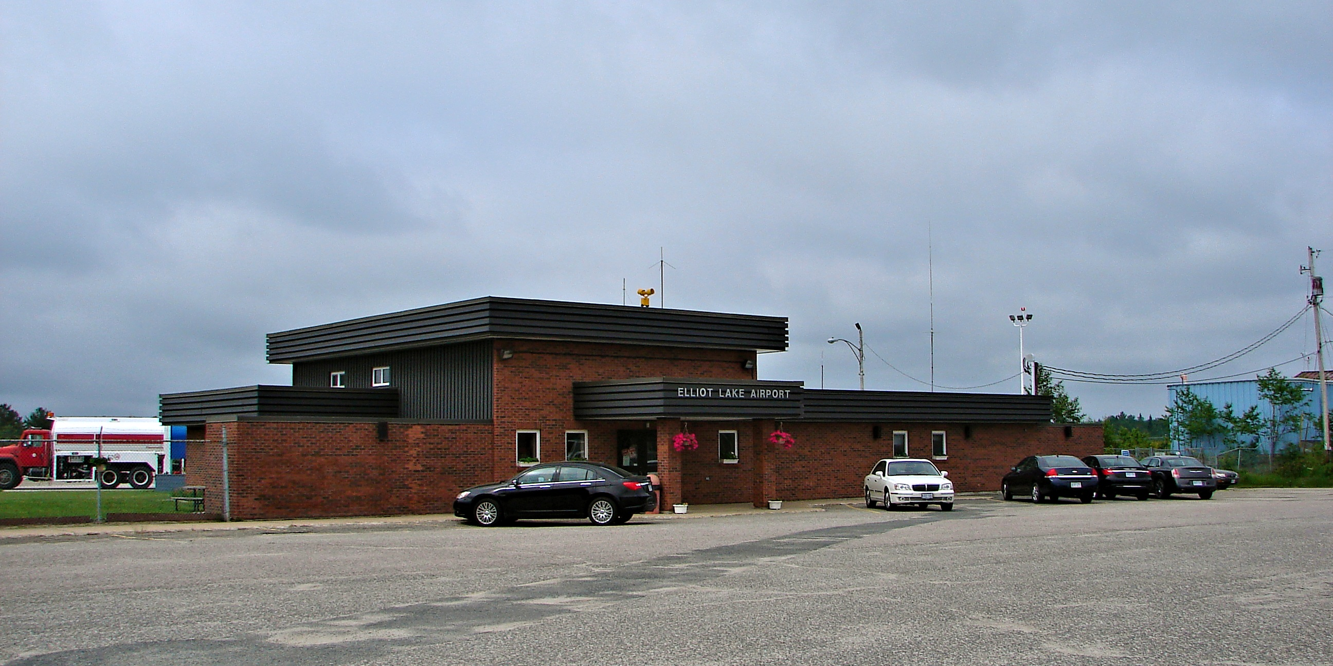 Elliot Lake Municipal Airport, Elliot Lake, Ontario, Canada